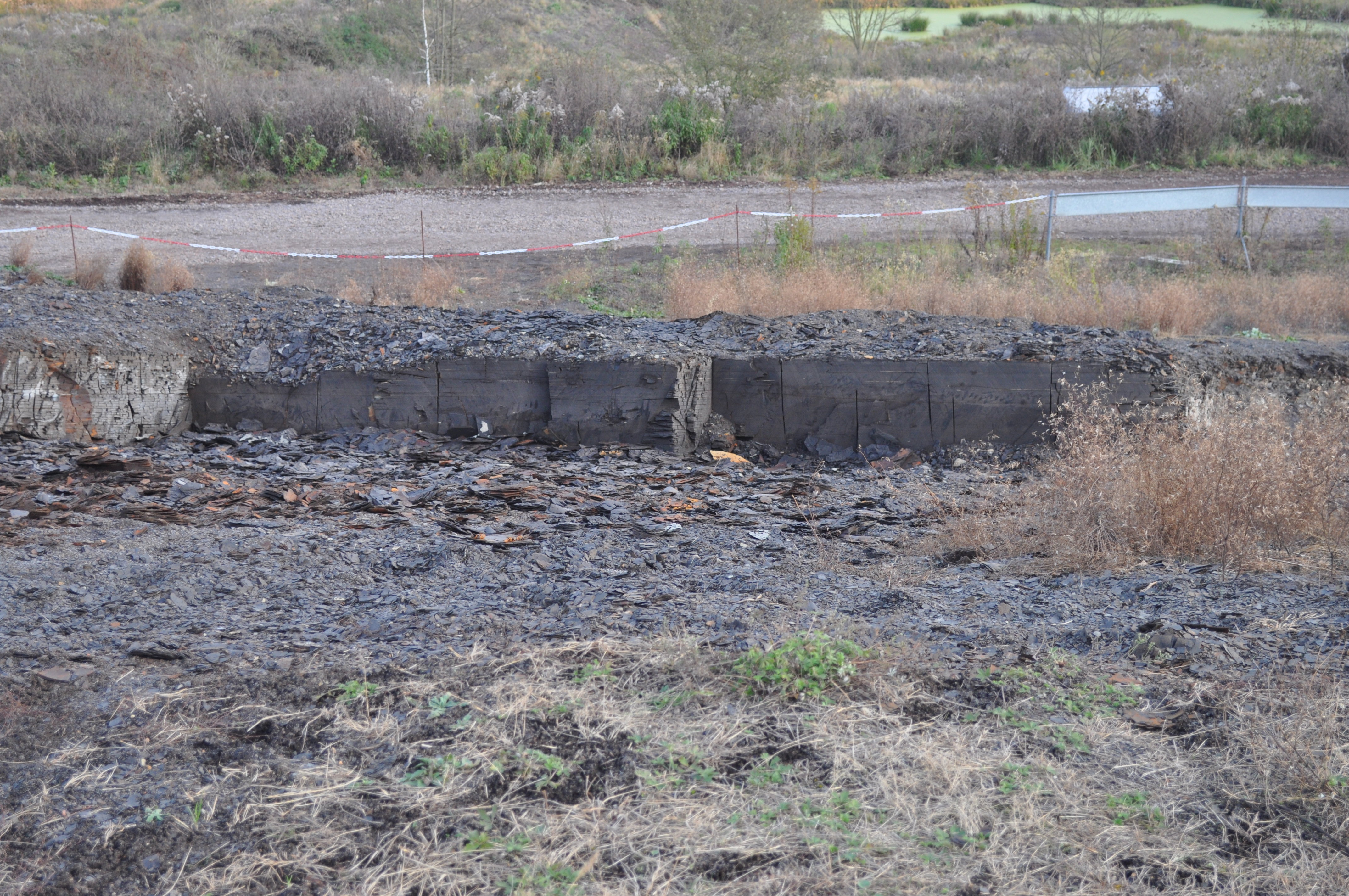 Sitio de excavación en el yacimiento de fósiles de Messel.